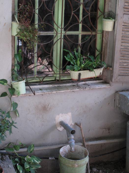 מיחזור מים